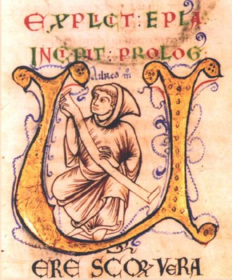 Fragmento del manuscrito medieval «De Speculo Caritatis», en el que aparece un retrato de Elredo de Rieval